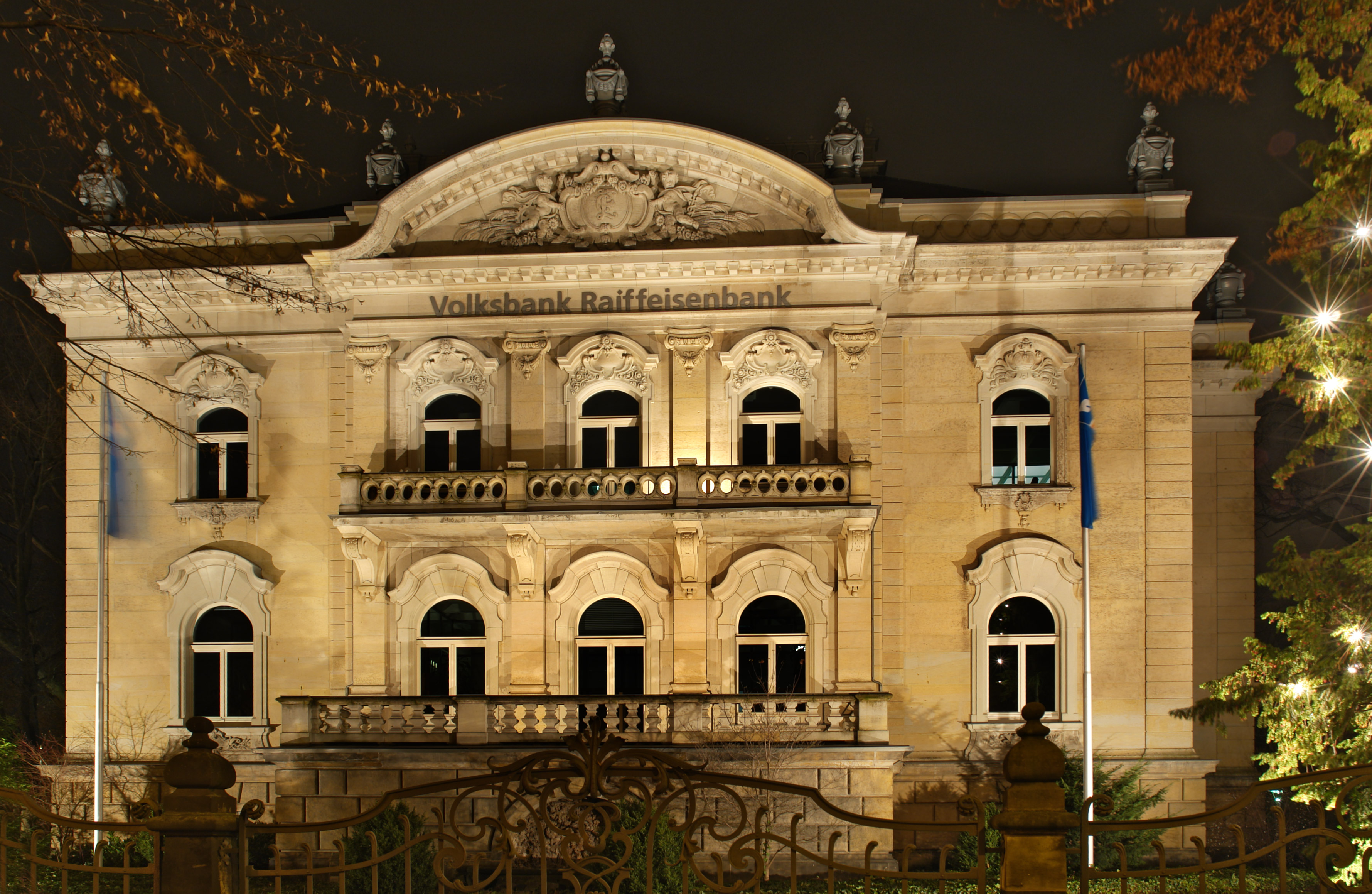 Volksbank Raiffeisenbank Villa Eschenbach Neobarock 1901 erbaut für Karl Eschenbach. Zerstörung 1945